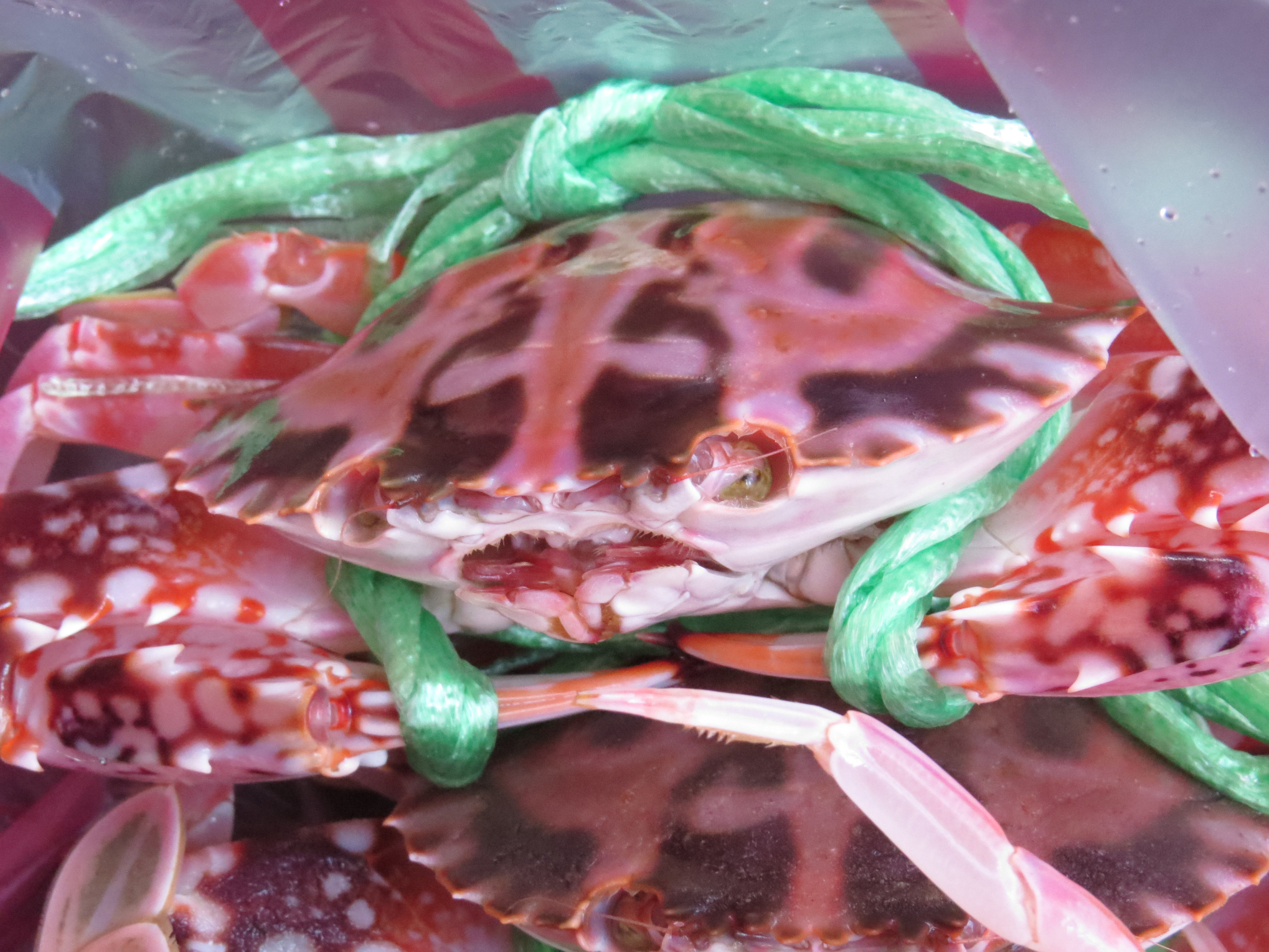 Bân-lâm-gú: 花蠘仔(hue-tshi̍h-á)，學名：Charybdis feriatus，佇龜吼漁夫市集翕的。中文（台灣）: 銹斑蟳，學名：Charybdis feriatus，在龜吼漁夫市集拍的。